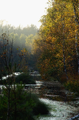 Moorgewässer Haspelmoor